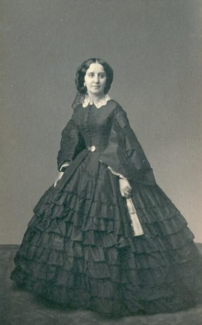 Нирод Мария Христофоровна, урожденная Лазарева (1822—1912)